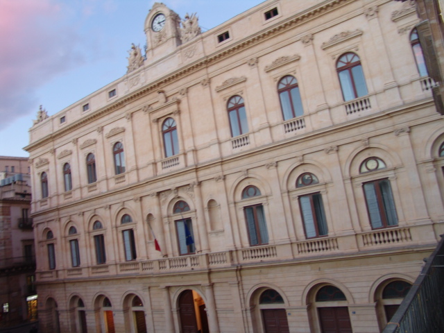 Palazzo dell'Aquila, Palazzo dell'Aquila